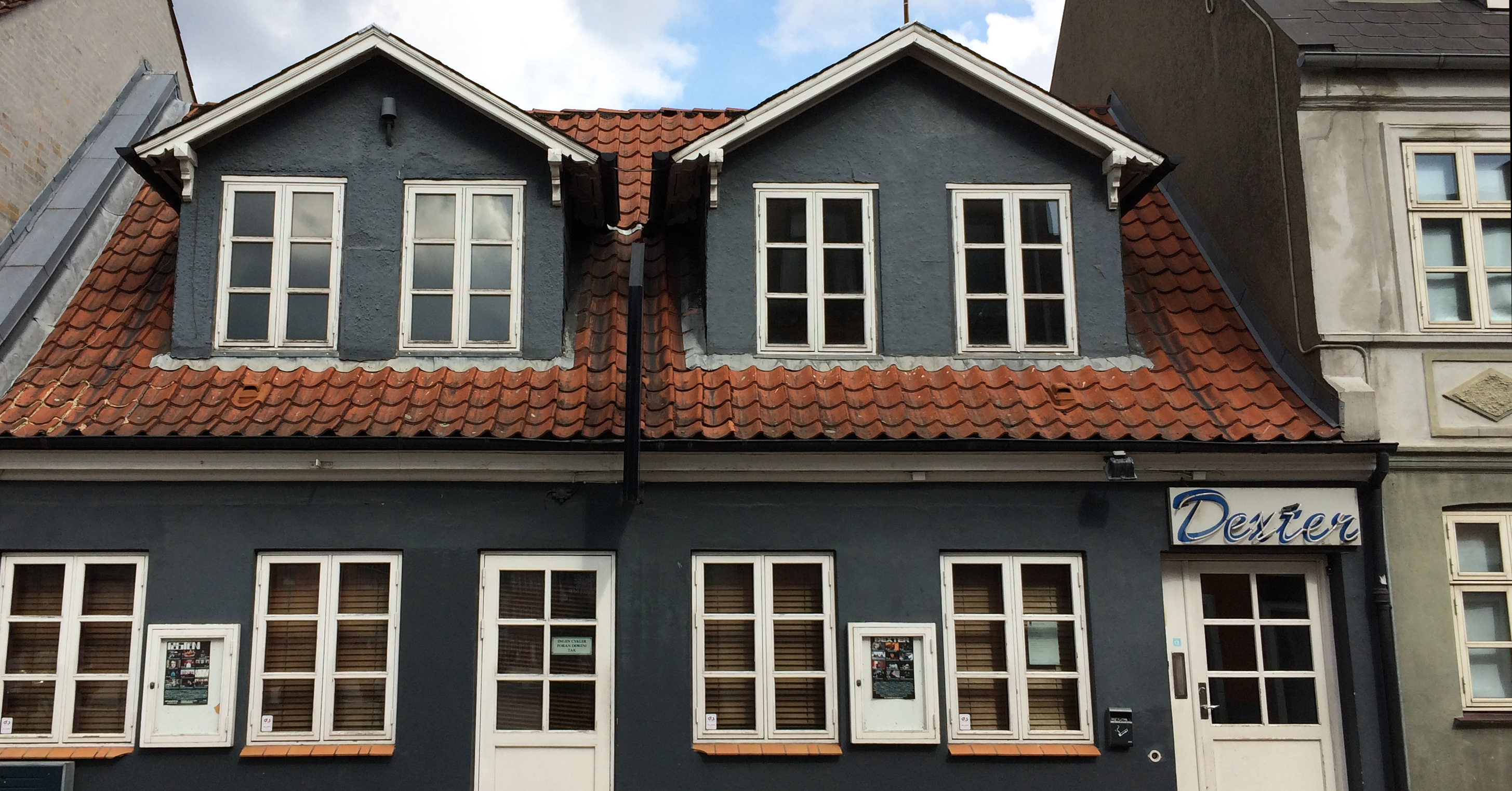 Traditionsrigt Jazzhus i Vindegade, Odense. Maj 2015.